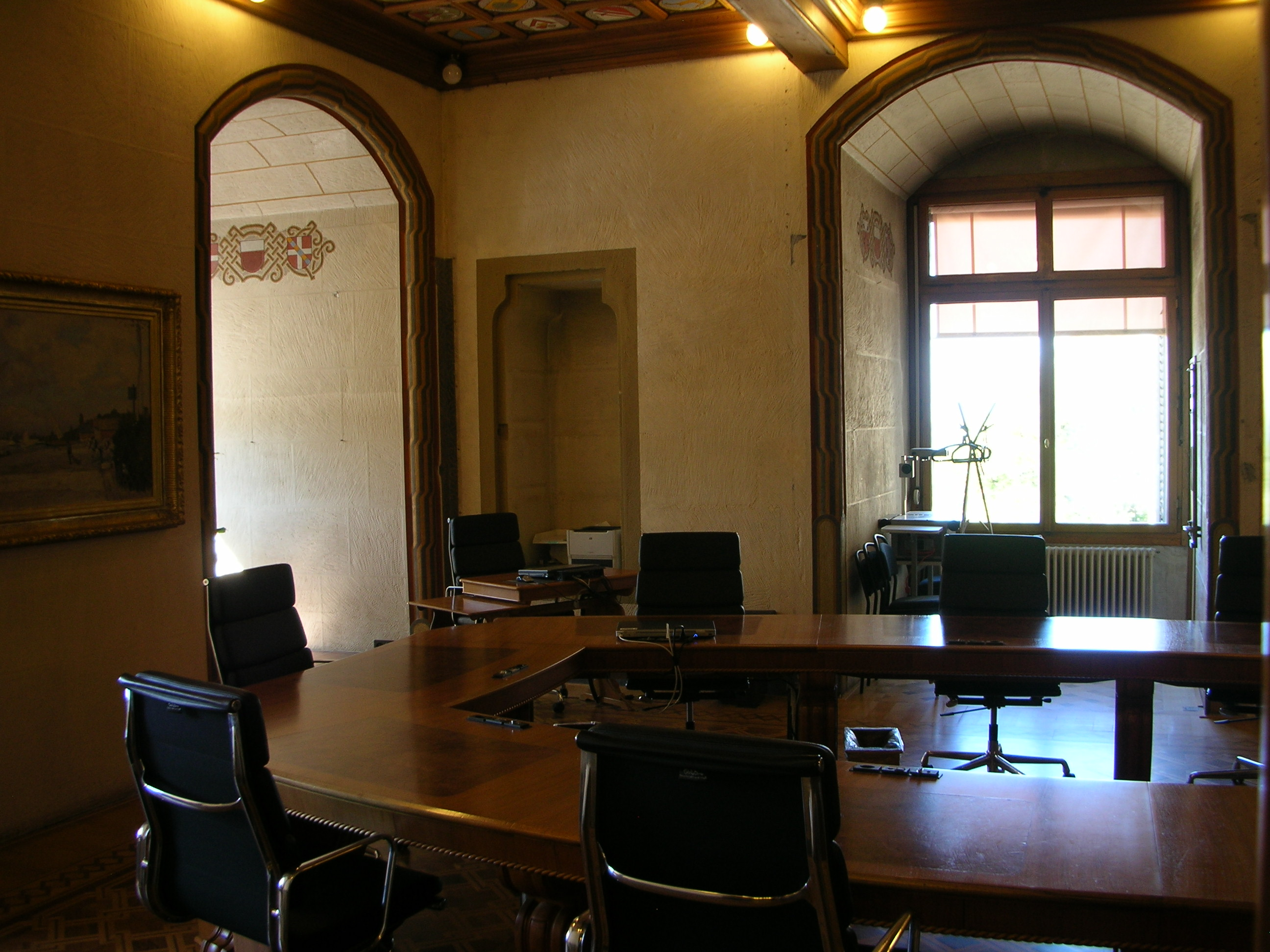 Lausanne: Château Saint-Maire, salle des séances du Conseil d'État (avant rénovation).